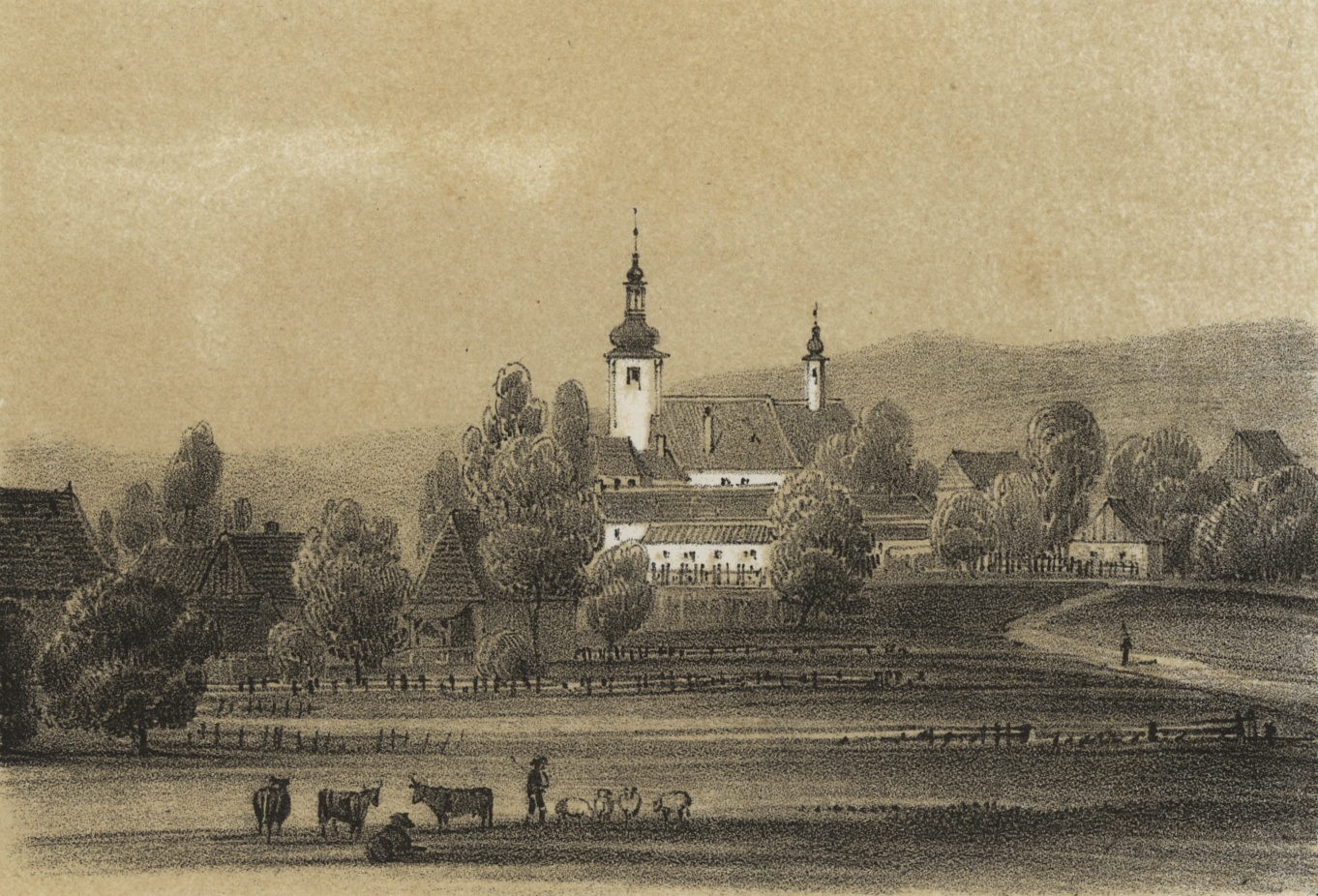 Tatenice